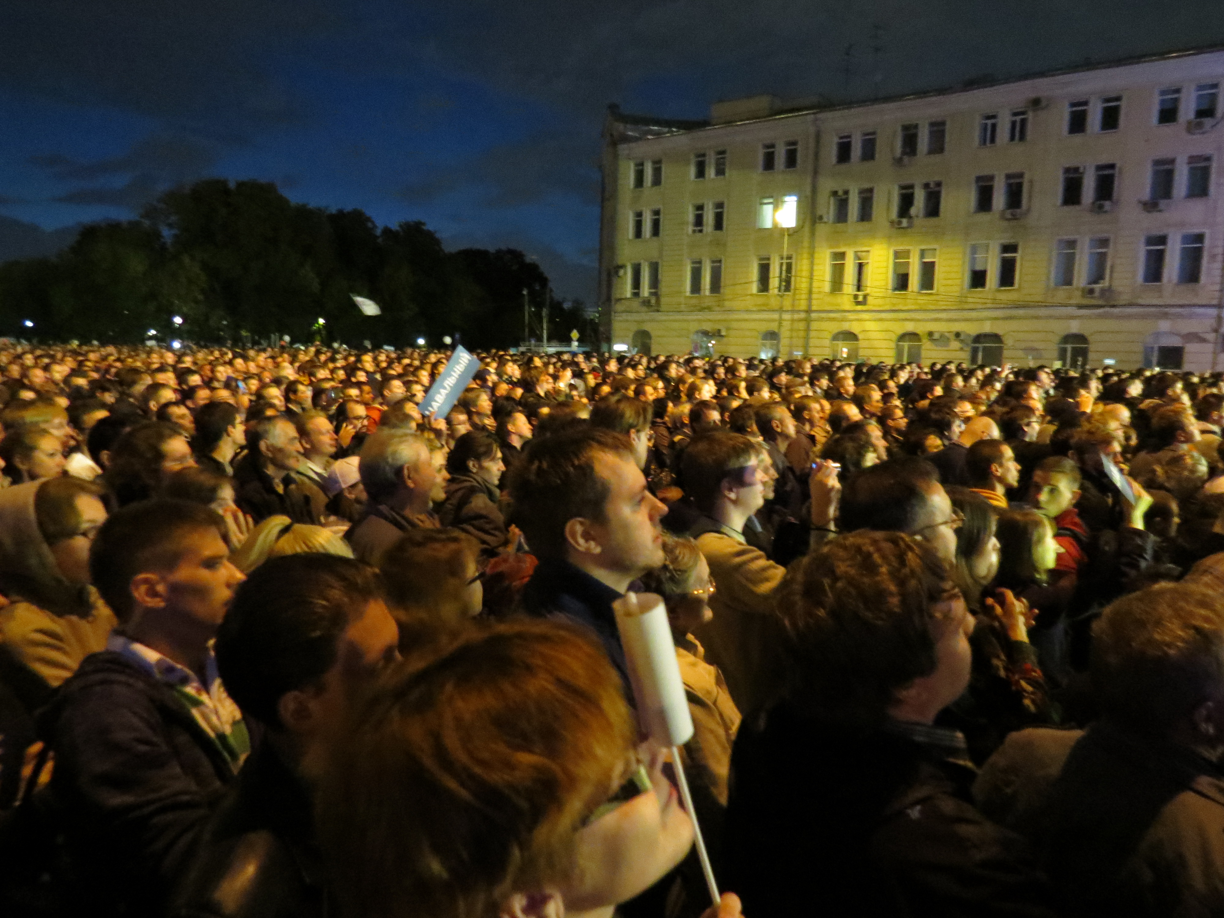 Митинг Алексея Навального на Болотной площади после объявления результатов выборов мэра Москвы, 9 сентября 2013 года